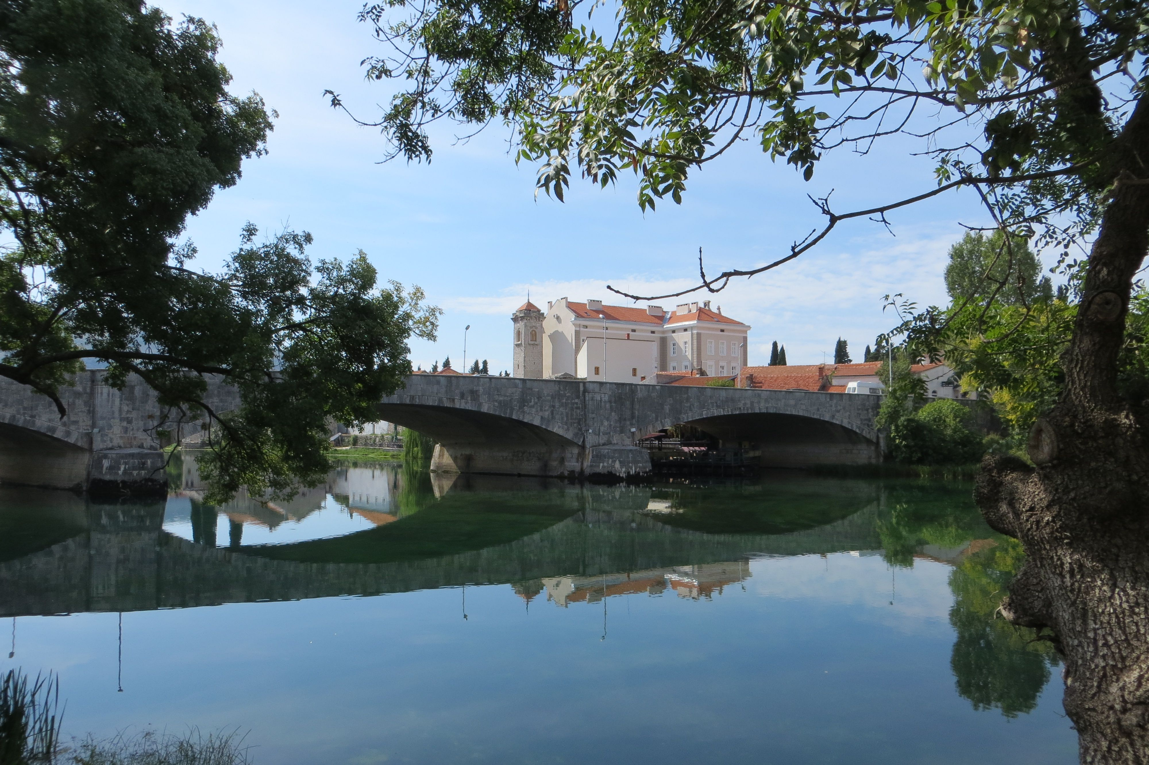 Trebišnjica